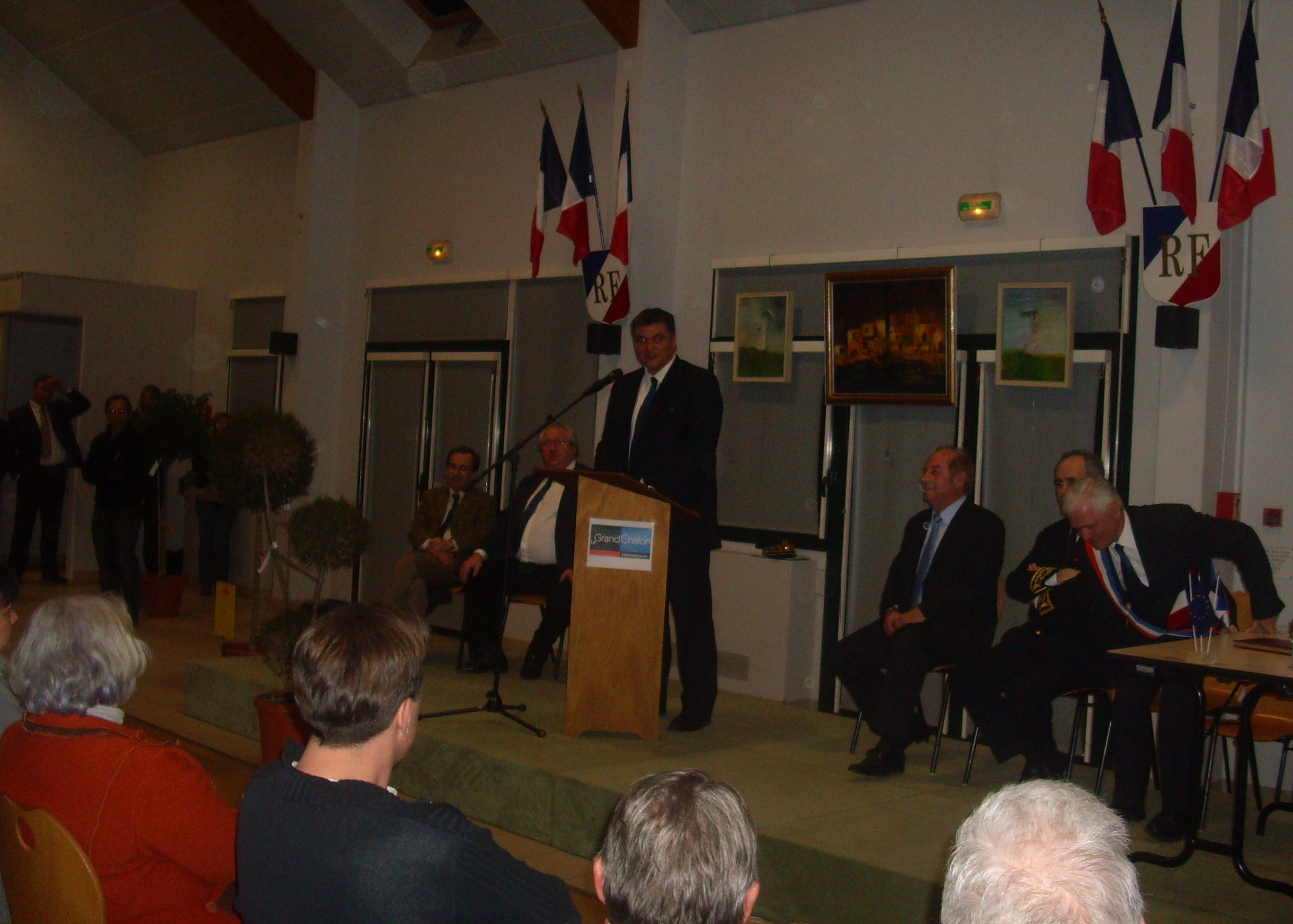 David Douillet lors d'une réunion publique avec des présidents d'associations sportives de la 3em circonscription de Saône-et-Loire à Mellecey.